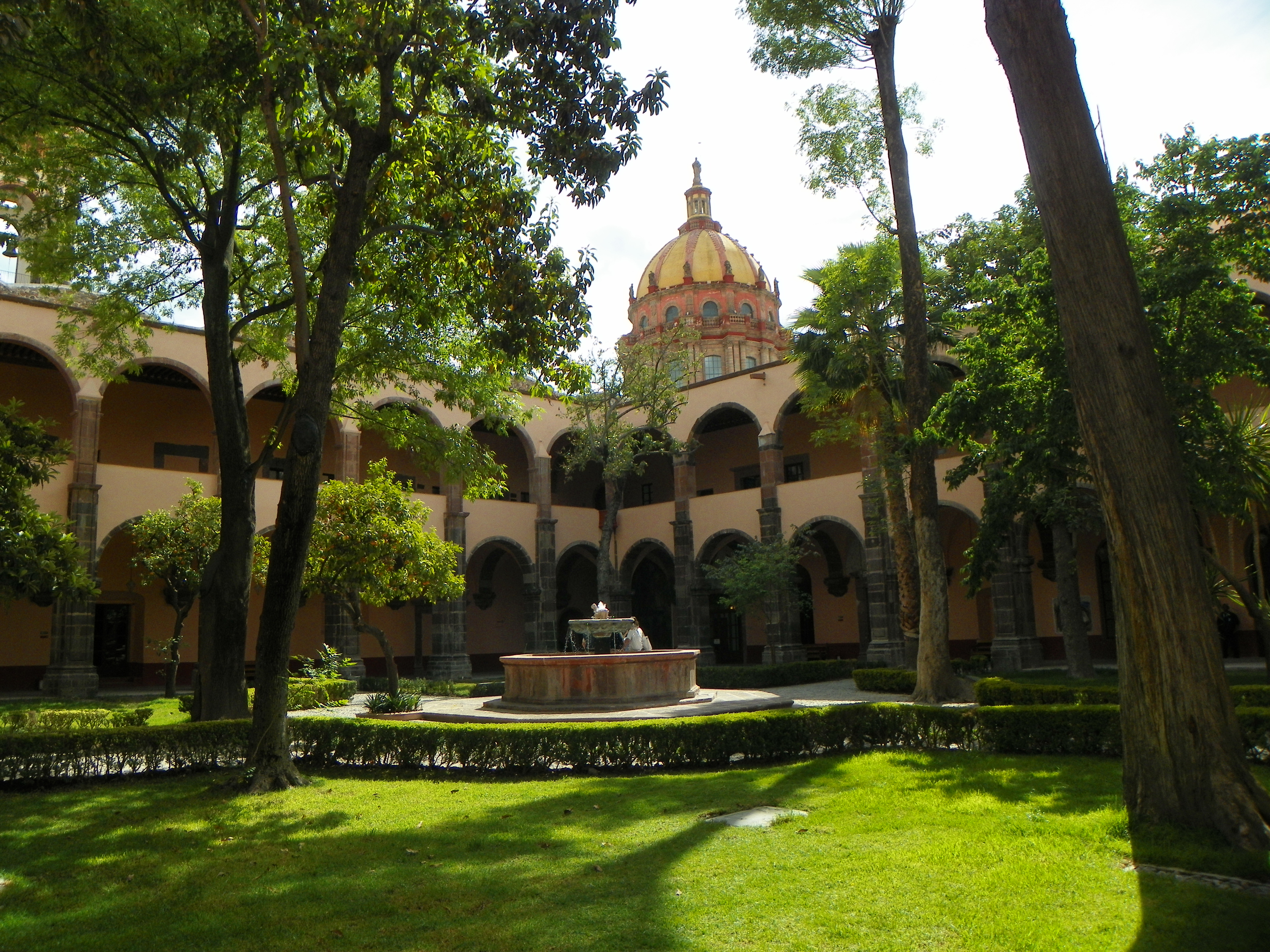 Vista del claustro del Convento de Nuestra Señora de la Concepción, actual Centro Cultural "El Nigromante" del siglo XVIII, en San Miguel de Allende, Guanajuato, México.